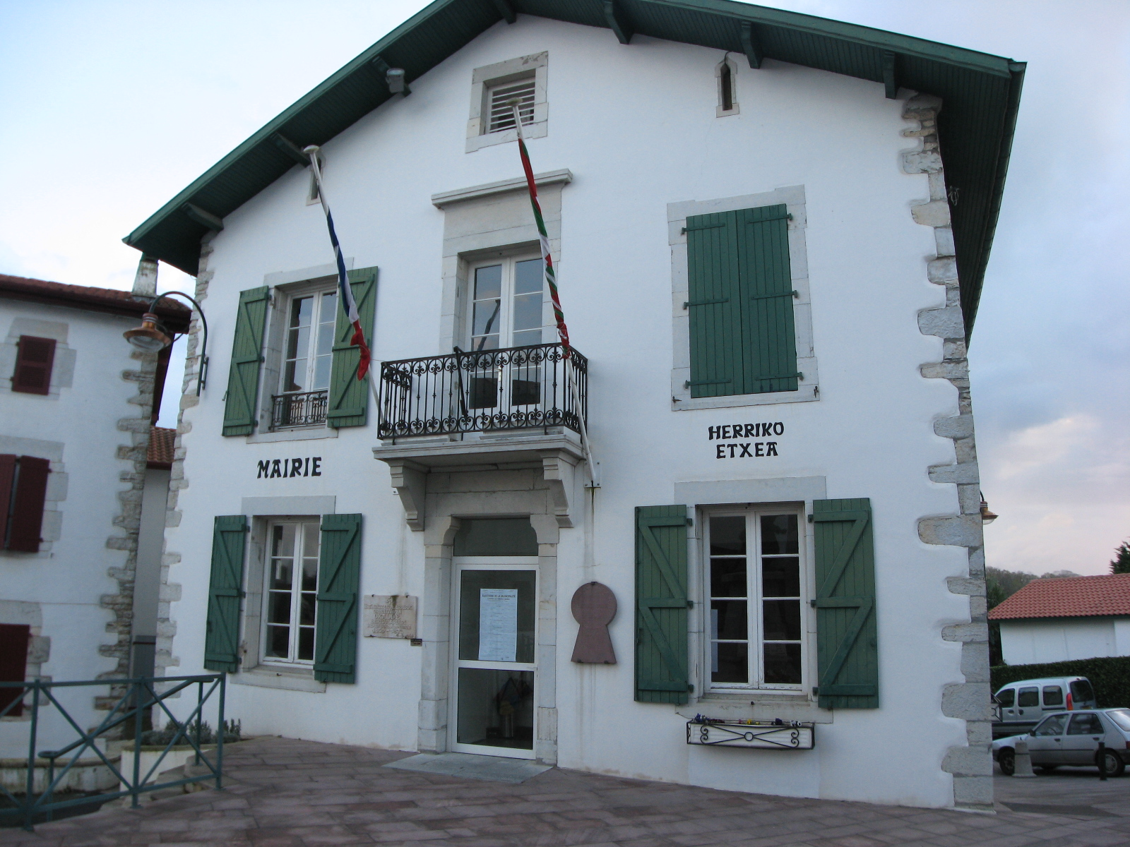 Mairie de Briscous (Pyrénées-Atlantiques) (Pyrénées).